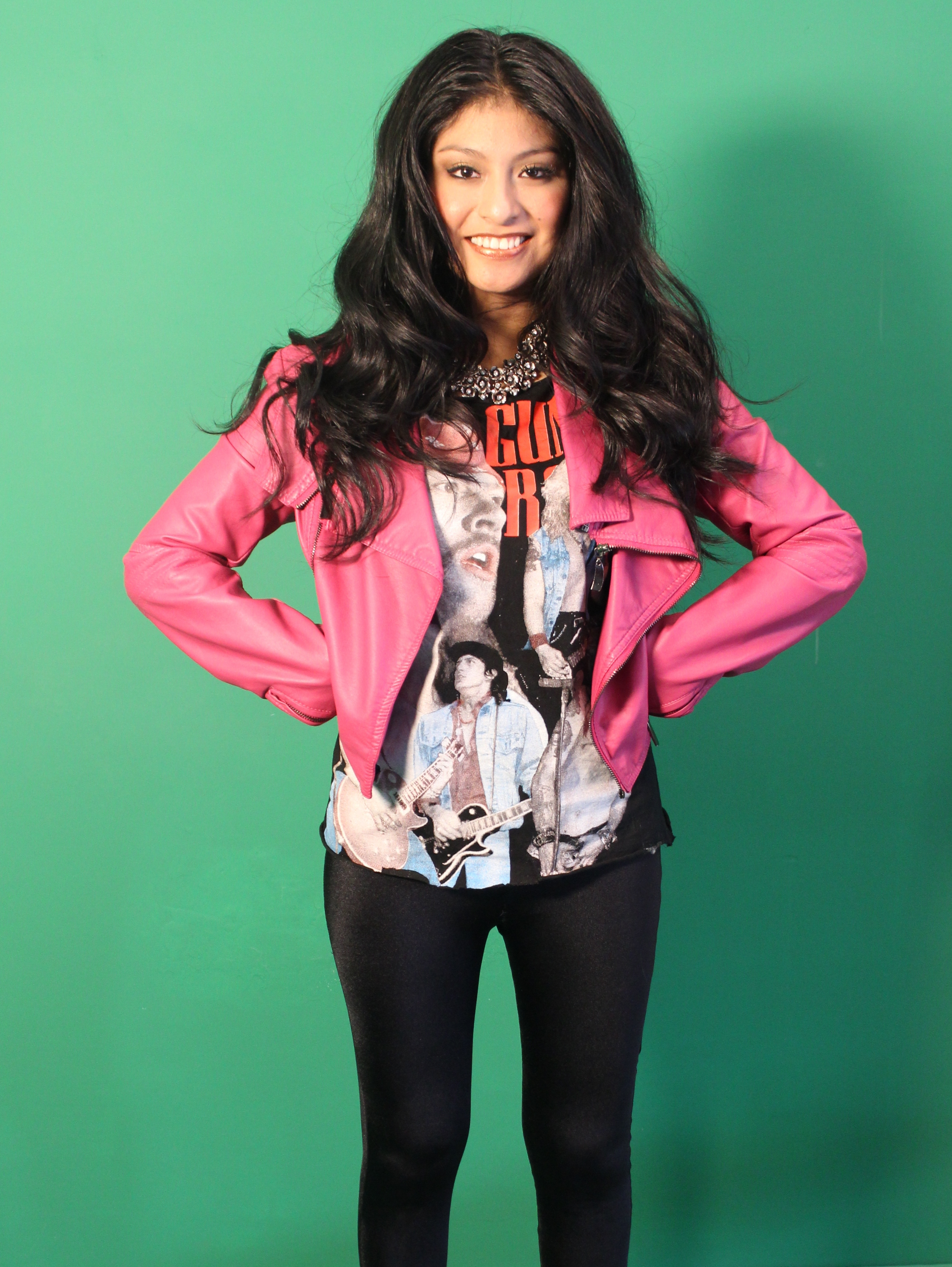 Backstage de la sesión fotográfica para la realización del videoclip 'Explosión' de Wendy Sulca en Buenos Aires